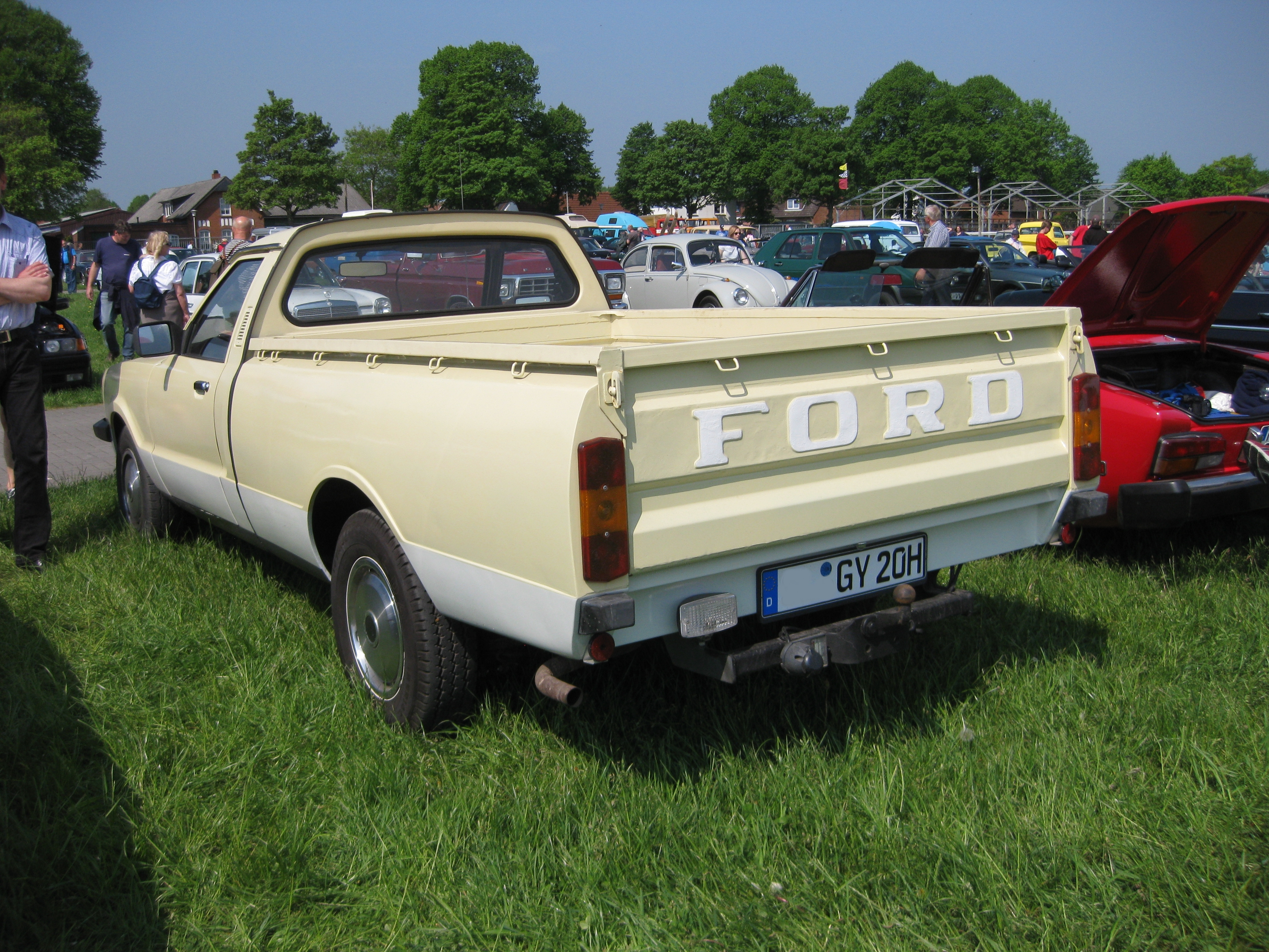 Ford Taunus Pickup Heckansicht